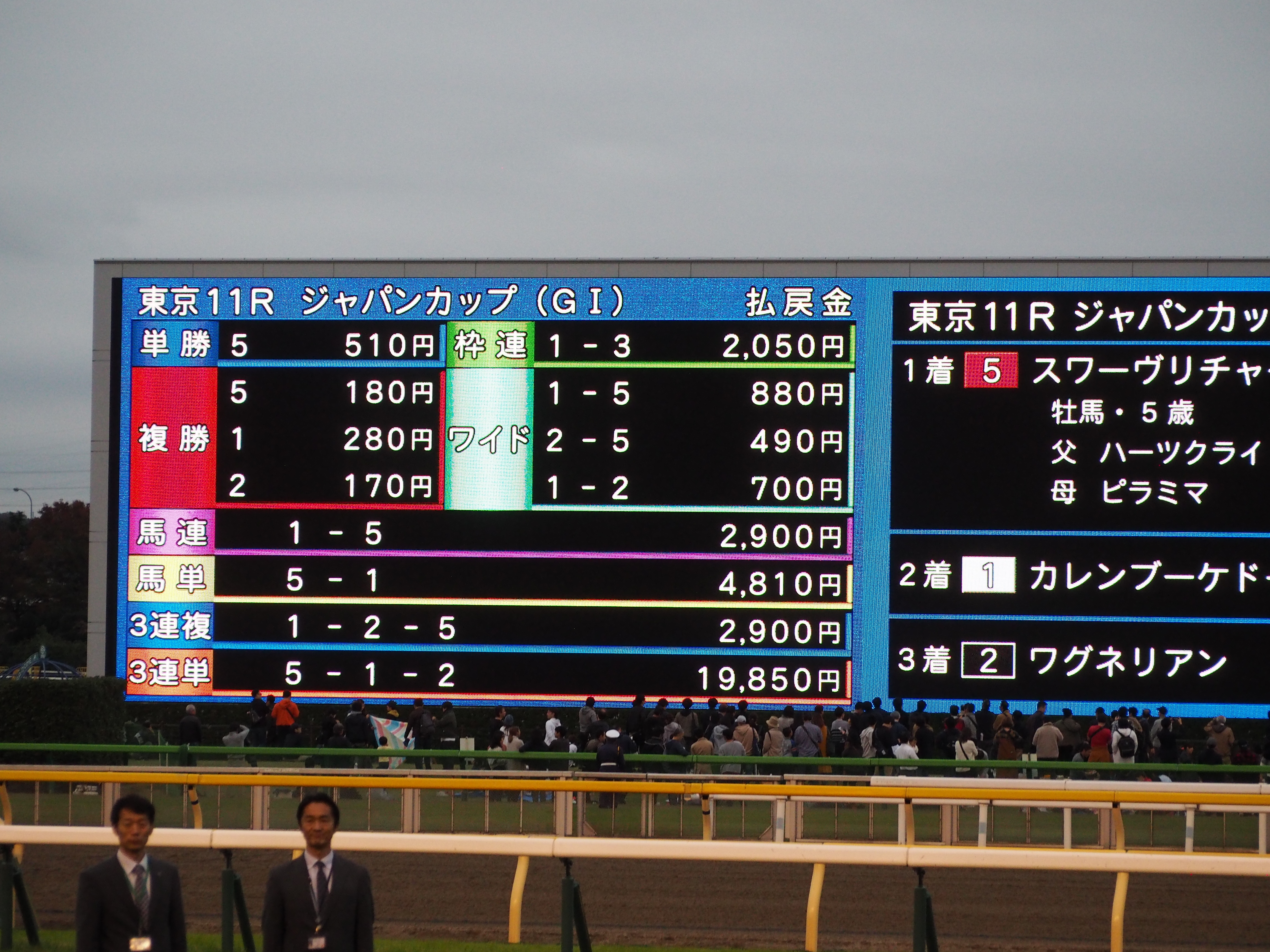 2019年のジャパンカップの配当を表示するターフビジョン